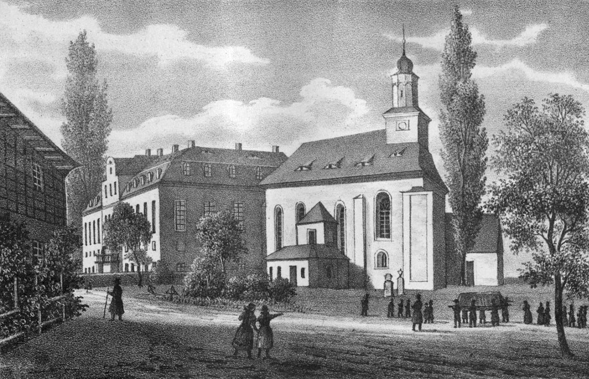 Die Kirche in Mölbis um 1840